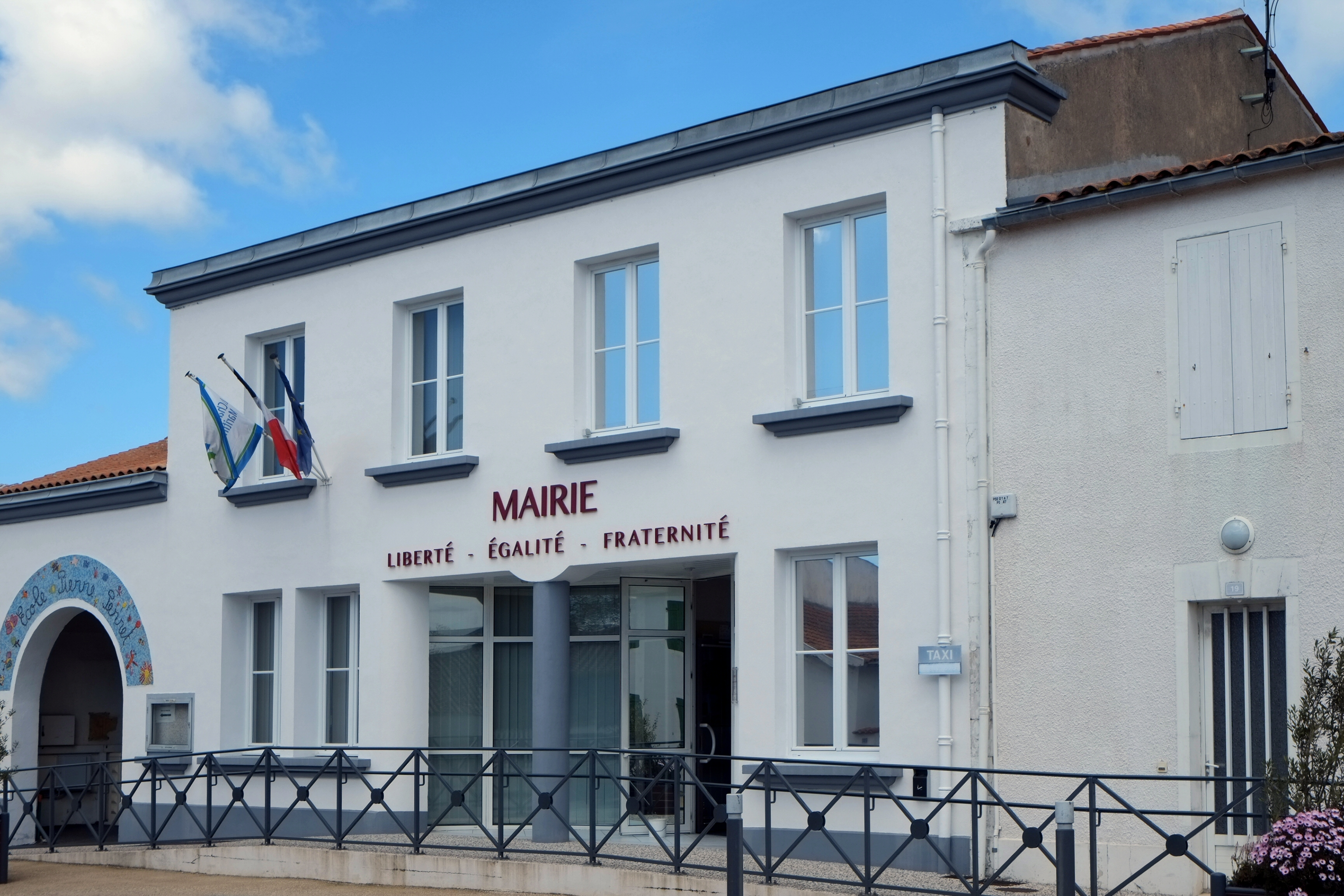 Mairie Clavette Charente-Maritime France